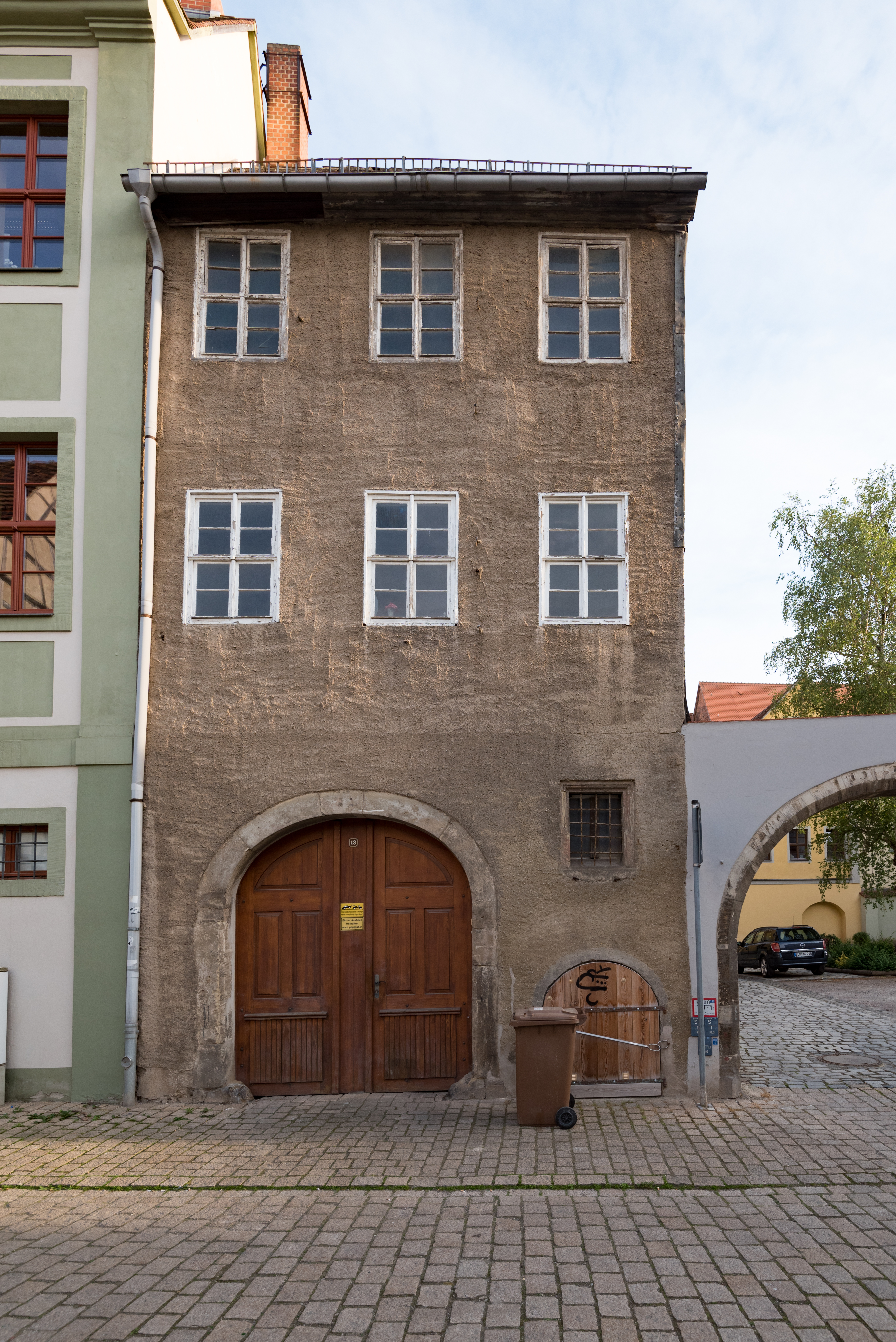 Naumburg (Saale), Mariengasse 13